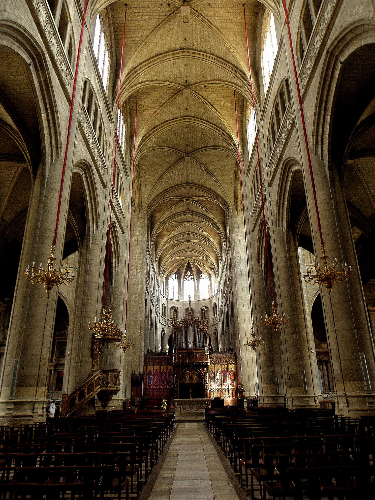 Intérieur de la cathédrale Sainte-Marie d'Auch (32).